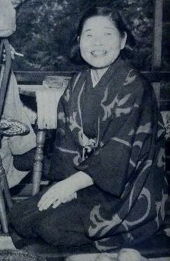 秋野不矩・沢宏靱夫妻